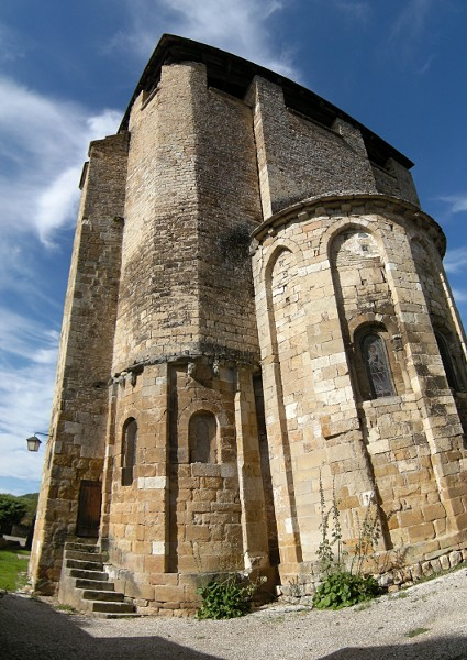 Église de Saint-Pierre-Toirac